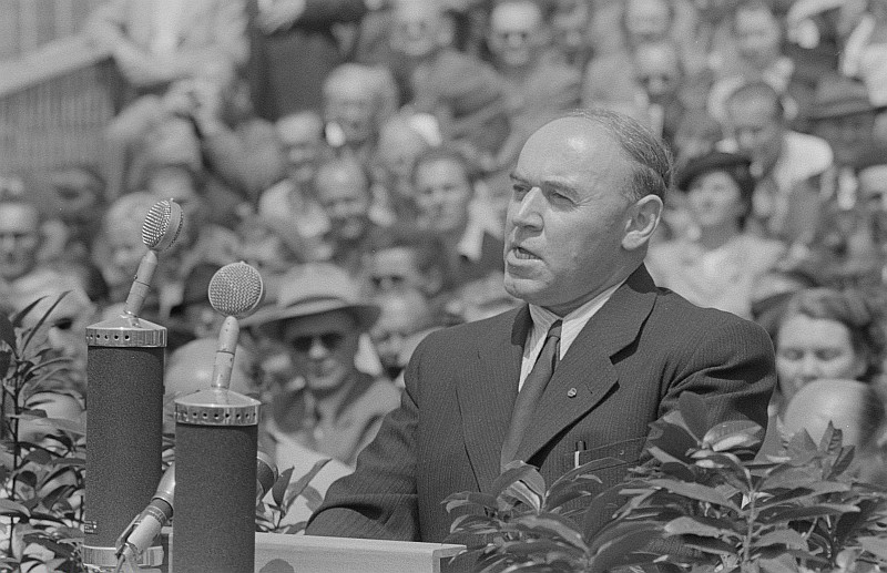 Original image description from the Deutsche Fotothek Paul Scholz (Minister für Land- und Forstwirtschaft) bei der Eröfnung der Fachmesse